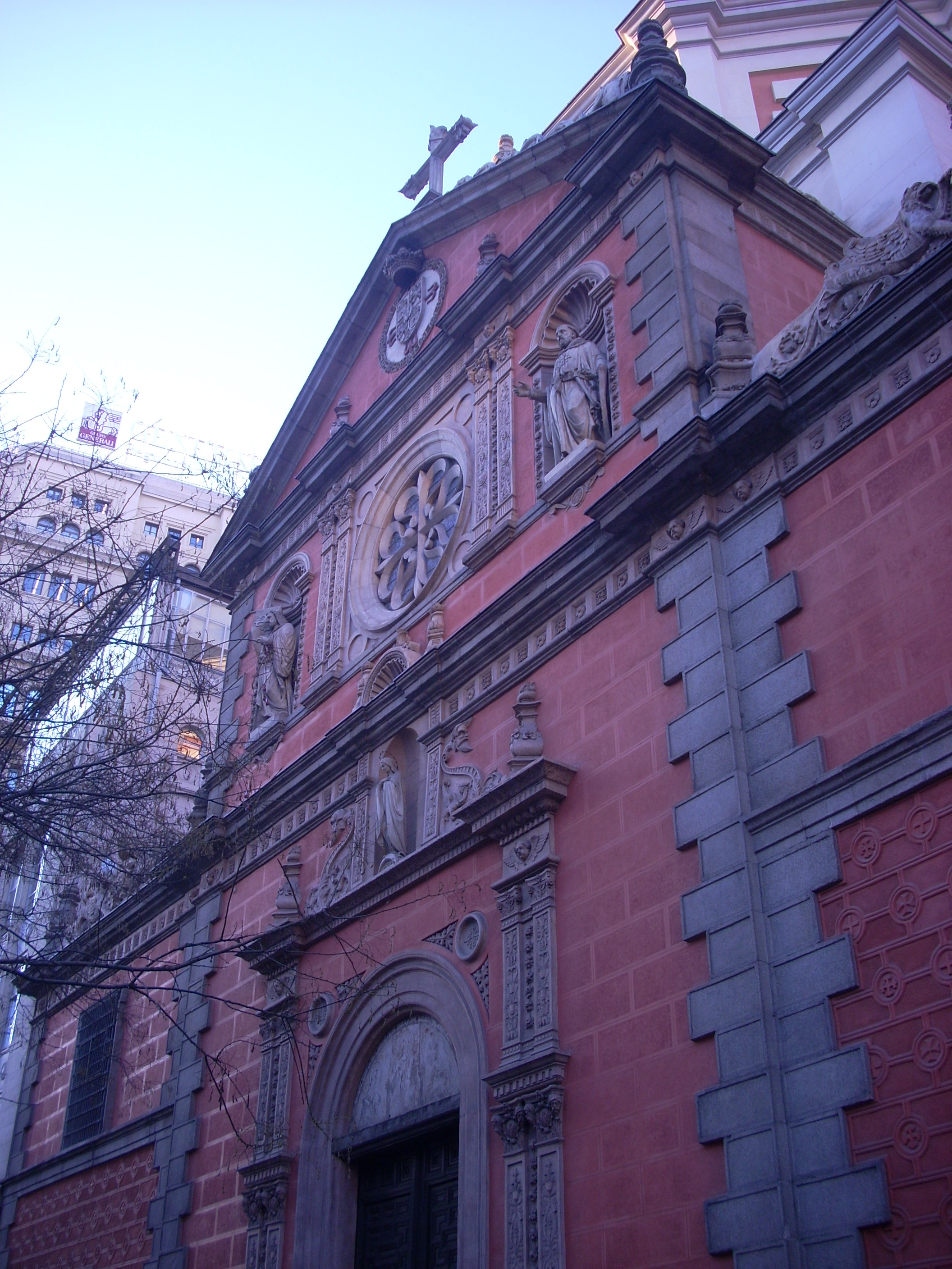 Iglesia de las Calatravas, Madrid, España.